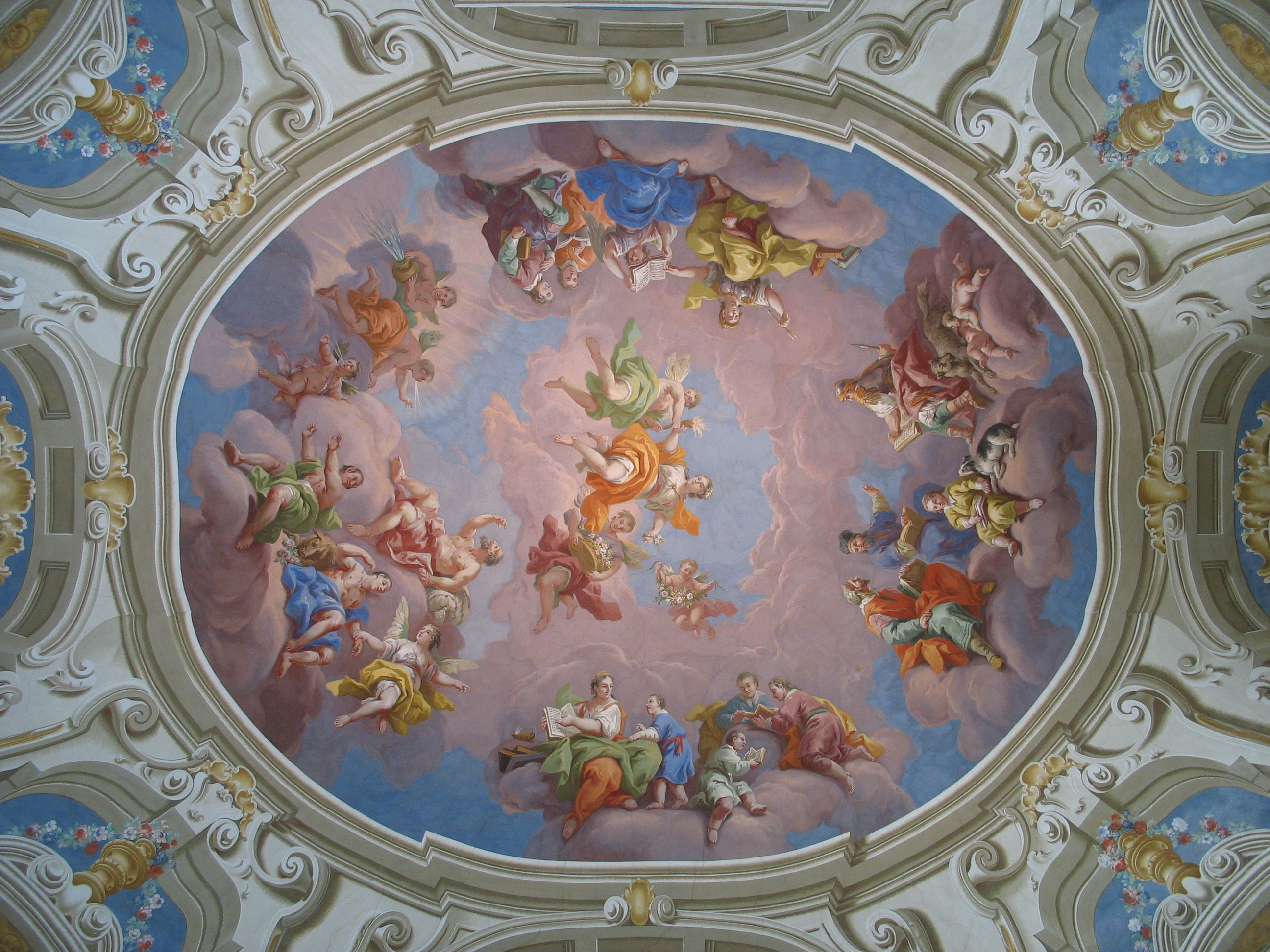 Stift Admont, Bibliothekssaal, Deckenfresko von Bartolomeo Altomonte. Dargestellt ist das Erwachen des Geistes (Aurora und Morpheus), Grammatik, Didaktik und die alten Sprachen Griechisch, Hebräisch, Latein. Weitere Details auf